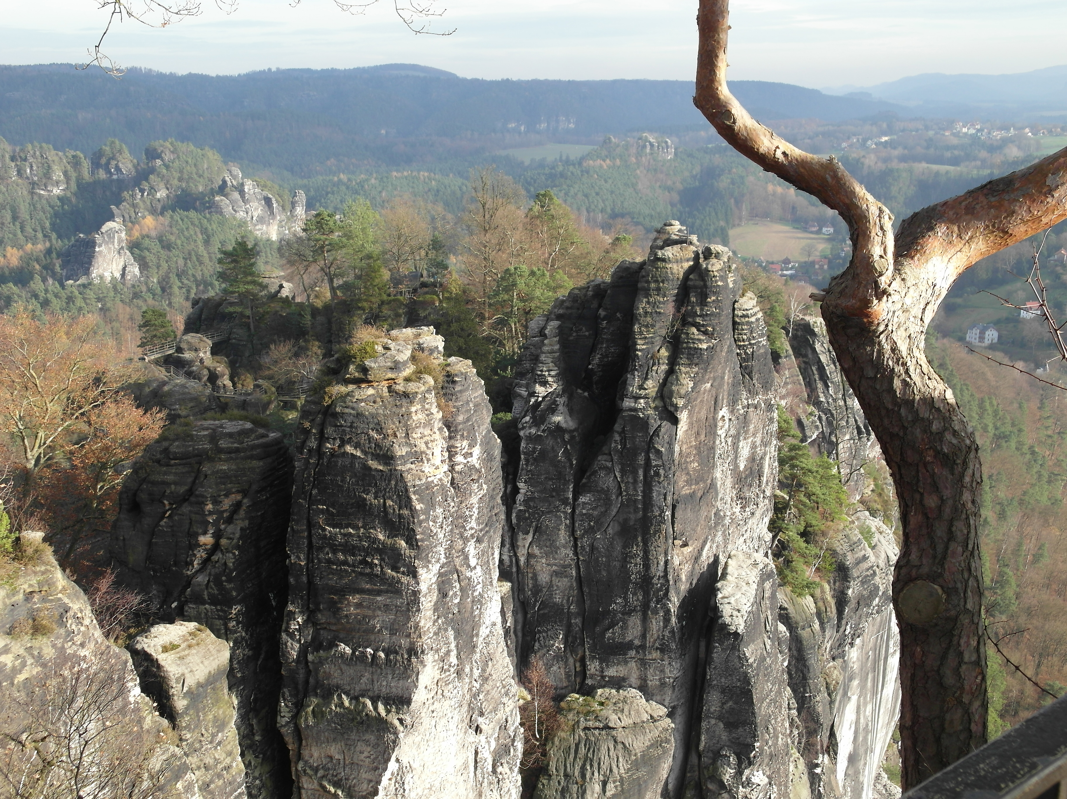 24.11.2017 01847 Lohmen / Bastei: Blick von der Basteiaussicht (GMP: 50.961685,14.071758) nach Osten. Im Vordergrund die Felsen Sieberturm (GMP: 50.961780,14.073944) und Steinschleuder (GMP: 50.961599,14.074555), hinter denen, hier verdeckt, die Basteibrücke verläuft. Dahinter sind die heutigen Holzstege erkennbar, mit denen die Felsenburg Neurathen (GMP: 50.961914,14.074722) erschlossen wird. [SAM2829.JPG]20171124185DR.JPG(c)Blobelt